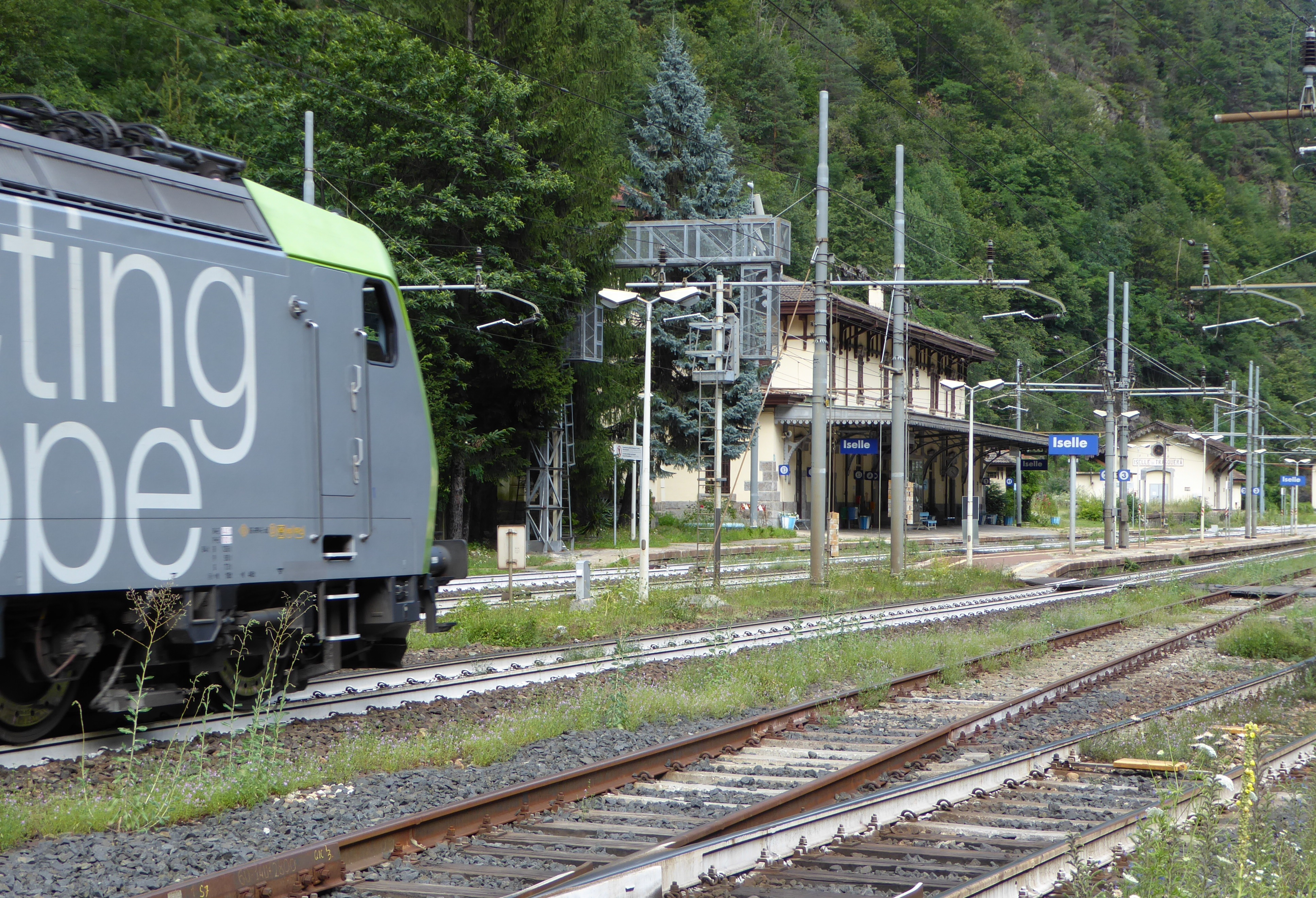 BLS Re 485 018 bei der Durchfahrt im Bahnhof Bahnhof Iselle di Trasquera